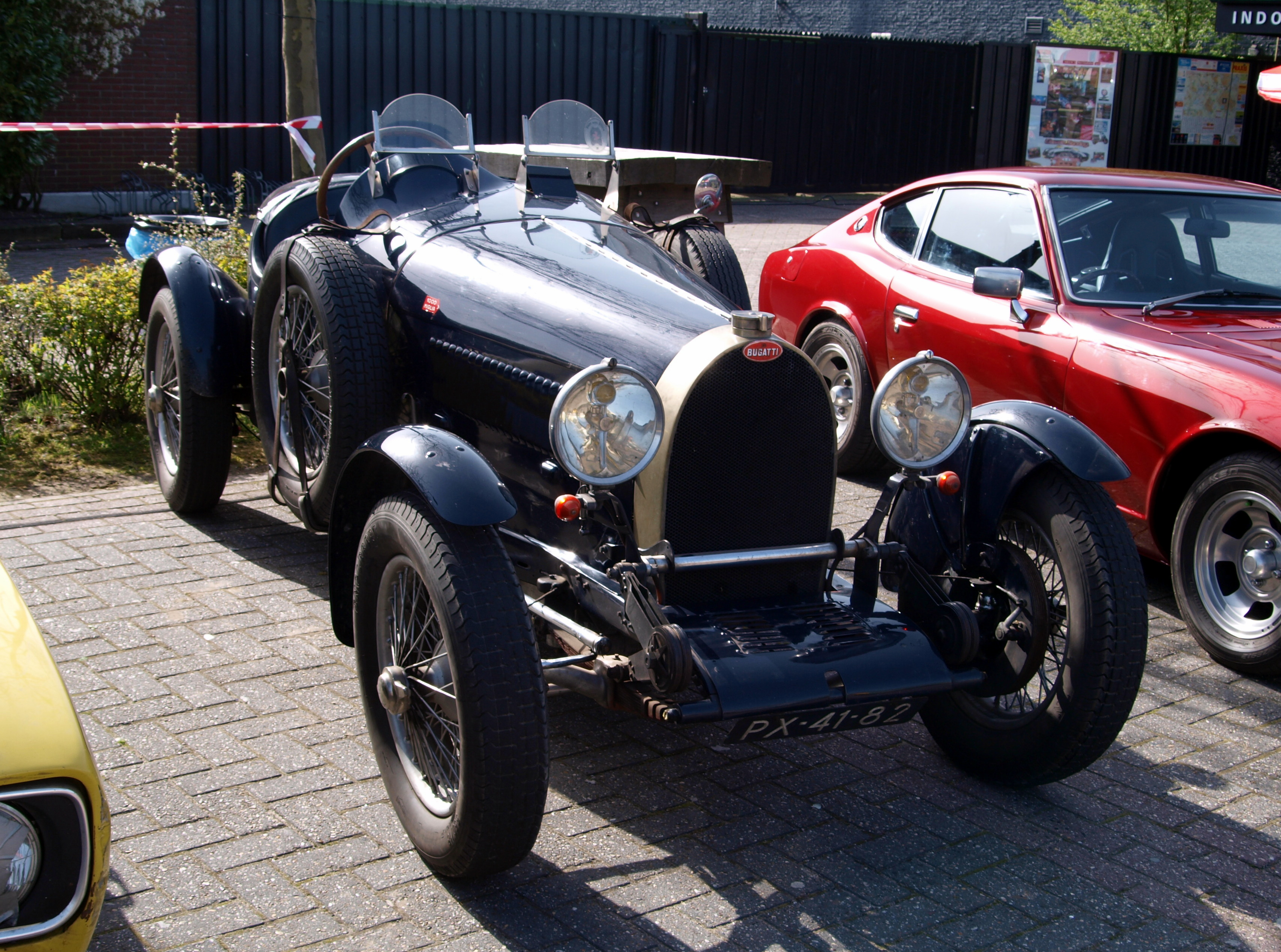 1931 Bugatti 49.